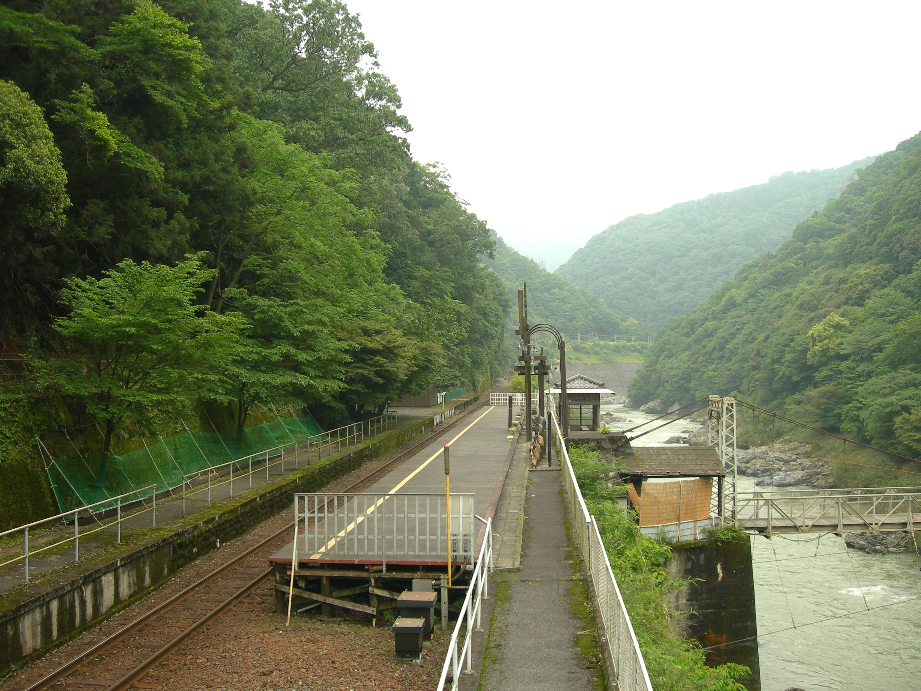 トロッコ保津峡駅ホーム